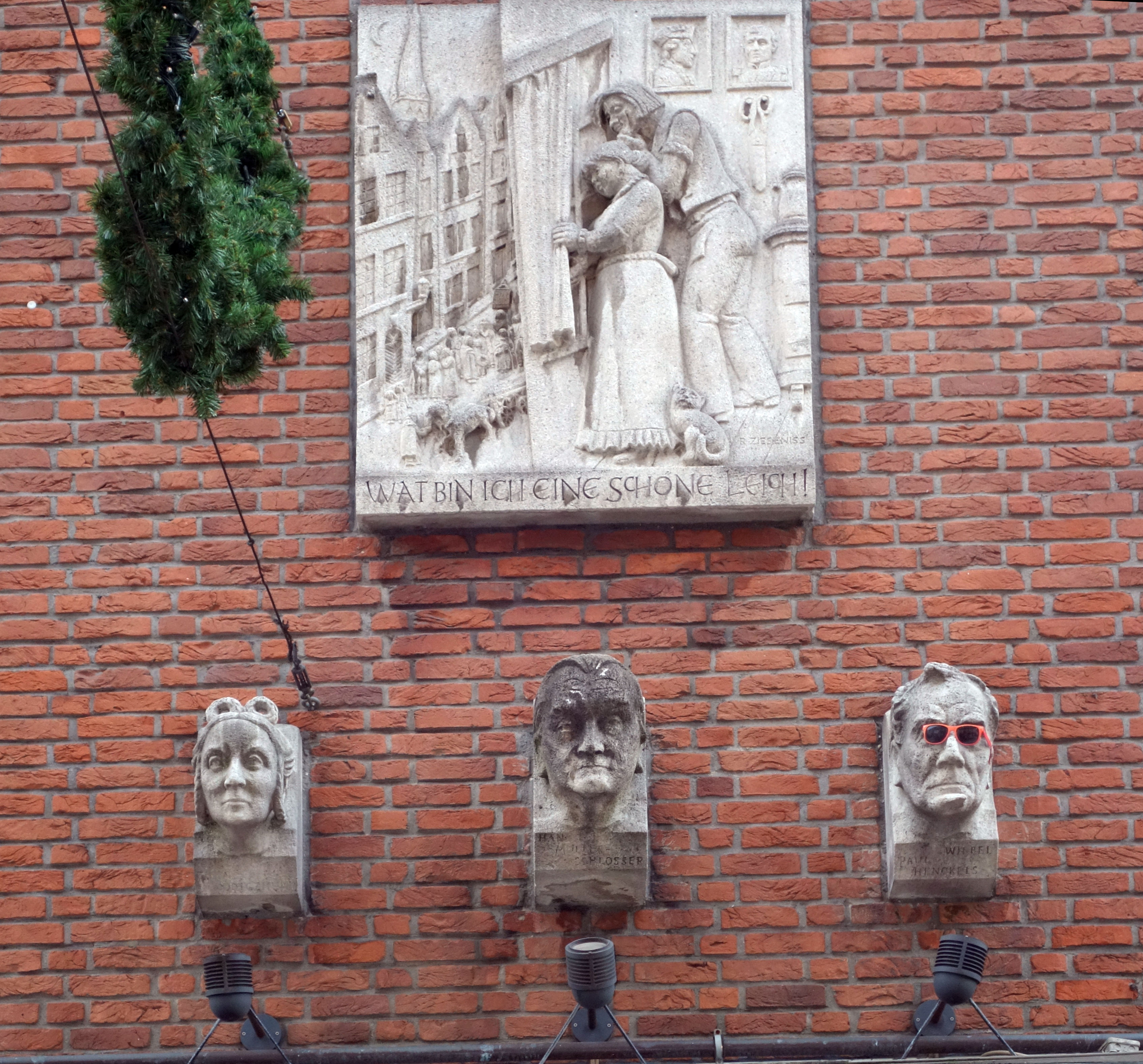 Schneider-Wibbel-Gasse in Düsseldorf, Oktober 2015. Relief am Schneider-Wibbel-Haus des Bildhauers Rudolf Zieseniss, Bolkerstraße, Wat bin ich eine schöne Leich! Darunter Porträts vom Bildhauer Rudolf Christian Baisch links: Thea Grodtzinsky in der Rolle der Frau Wibbel Mitte: Hans-Müller-Schlösser, Autor des Theaterstücks "Schneider Wibbel rechts: Paul Henckels in der Rolle des Wibbel